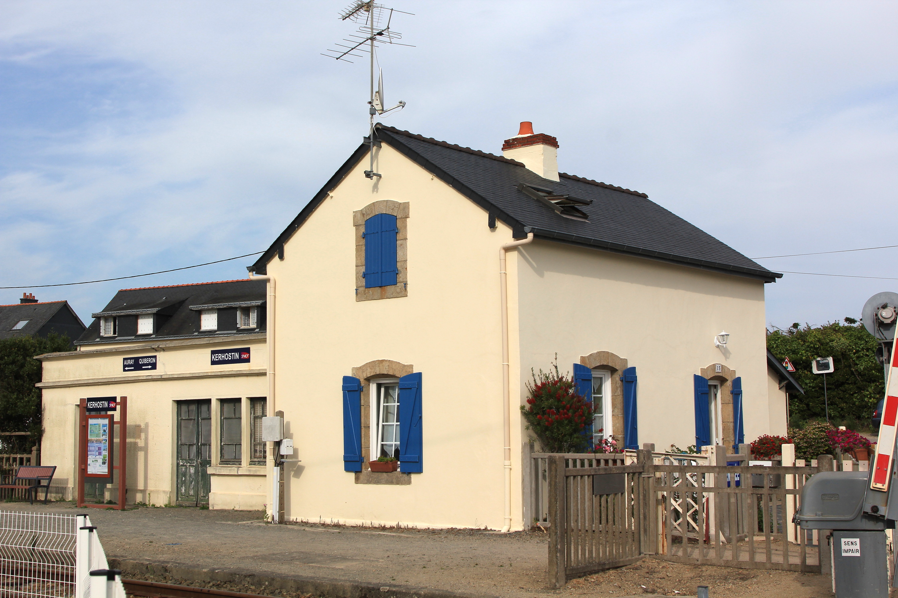 L'ancien bâtiment voyageurs de la gare de Kerhostin.